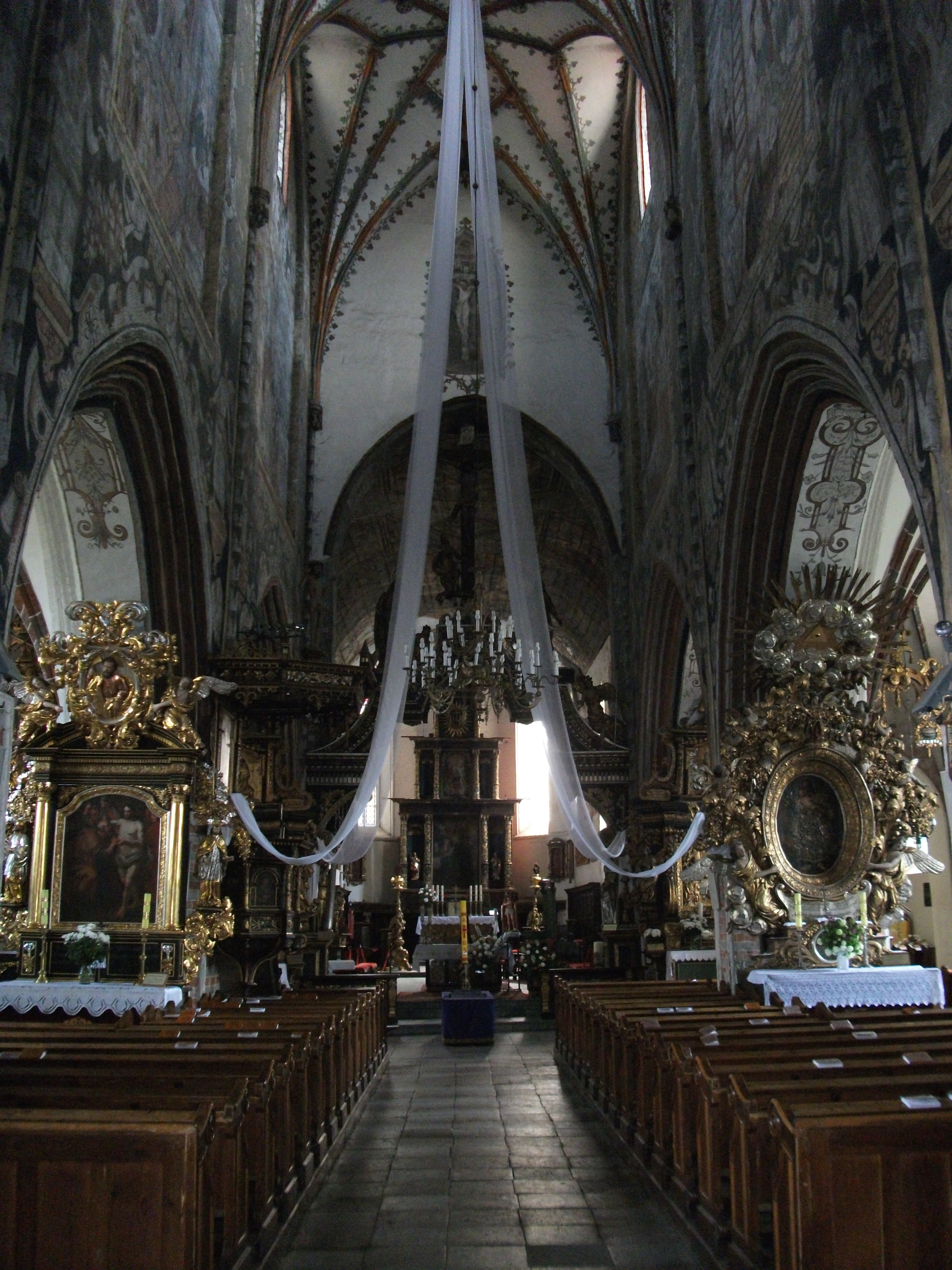 Wnętrze kościoła parafialnego p.w. Św. Tomasza Apostoła w Nowym Mieście Lubawskim